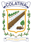 Web Site da Prefeitura de Colatina - ES